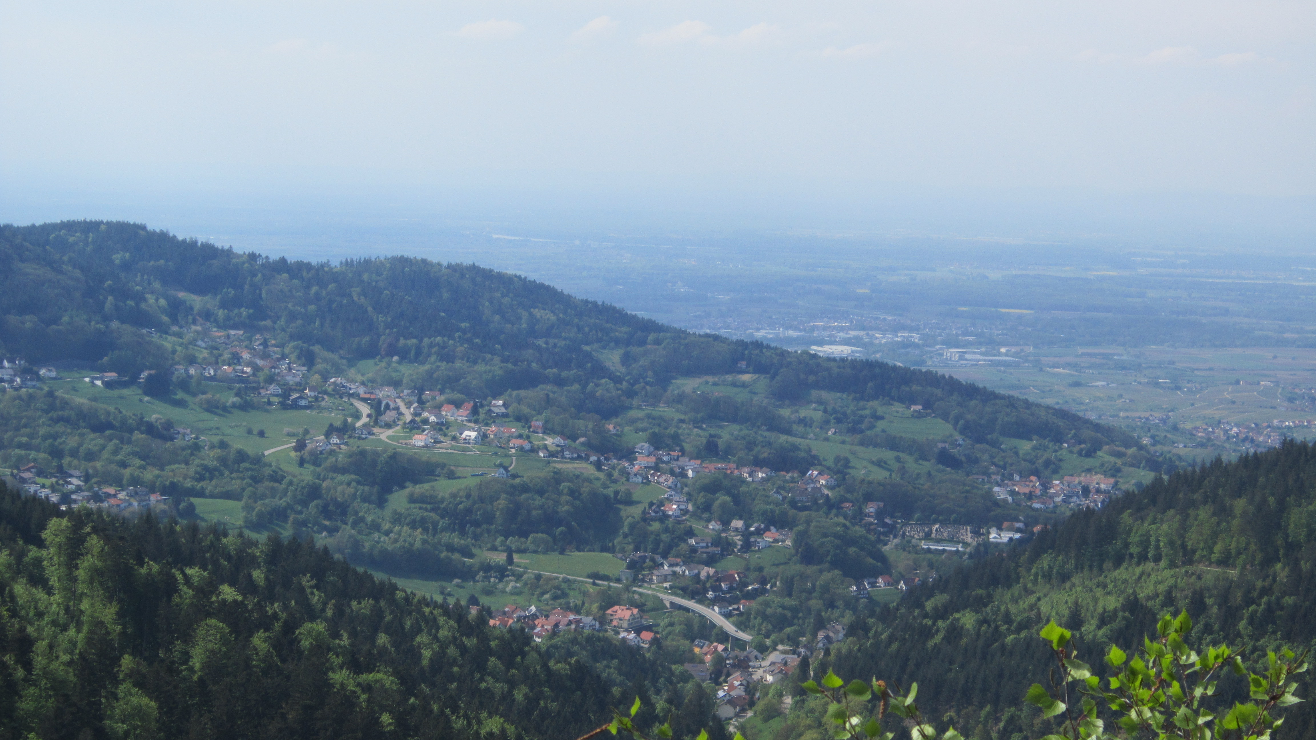 Blick vom Wiedenfelsen auf Bühlertal und die Oberrheinebene